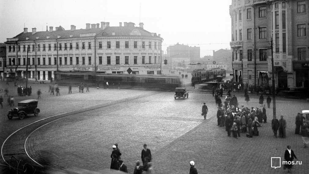 Смоленская площадь в 1930-х. Исторически, на этом месте был Смоленский рынок (снесен в 1920-е годы); его строения физически отделяли площадь от Садового кольца. Смоленской площадью в точном смысле же и тогда назывался, и ныне называется отрезок Садового кольца, уходящий направо (со временем почти всё её протяжение занял вышеупомянутый рынок). А собственно площадь - не Смоленская, а Смоленская-Сенная. Хотя в живом языке всё наоборот. Угловой дом справа - сохранился, на месте снесенного дома слева - пустырь перед зданием МИДа.